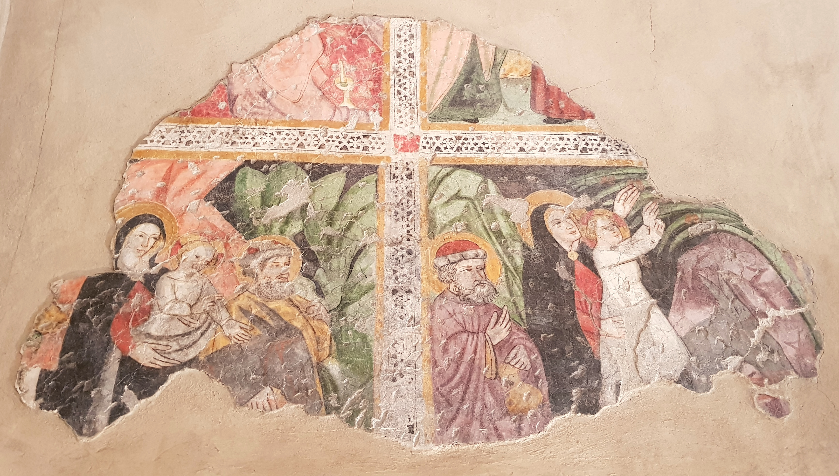 Chiesa di Ognissanti di Ospedaletto - Secondo strato di affreschi: Fuga in Egitto e Miracolo della Palma. Secolo XV